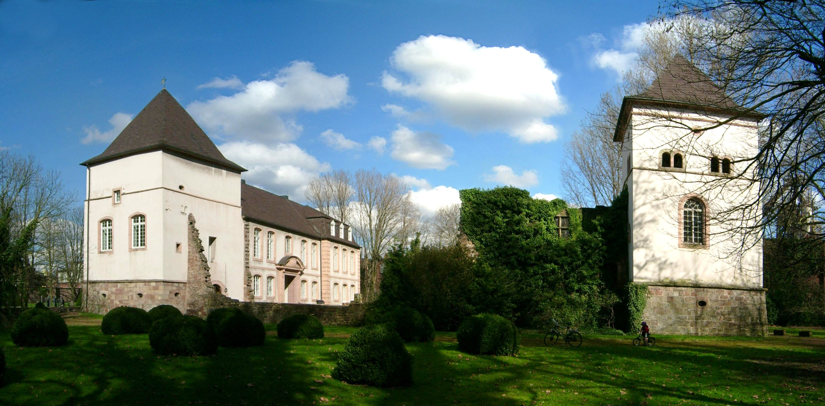 Altes Schloss in Dillingen/Saar, Rückseite